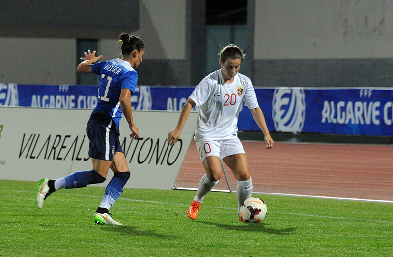 a_45_5548